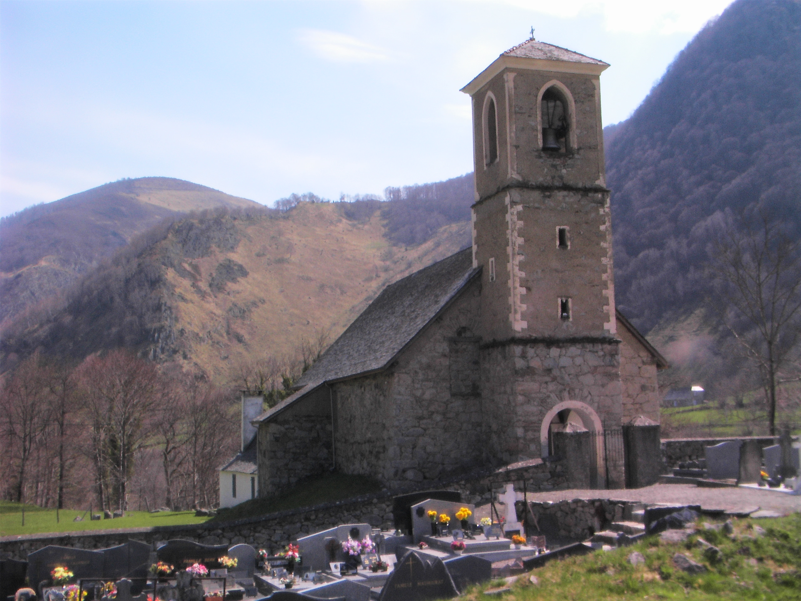 Estaing, France